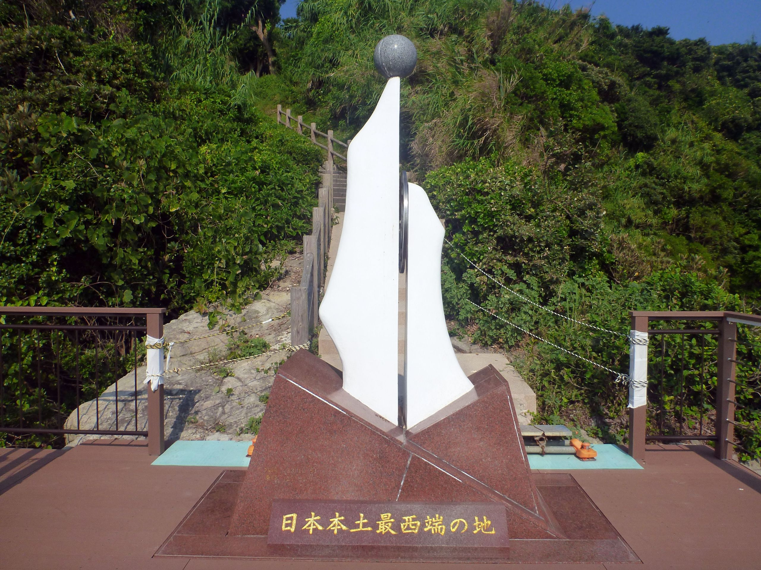 Kōzakihana monument in Kōzakihana park (Sasebo, Nagasaki Prefecture).